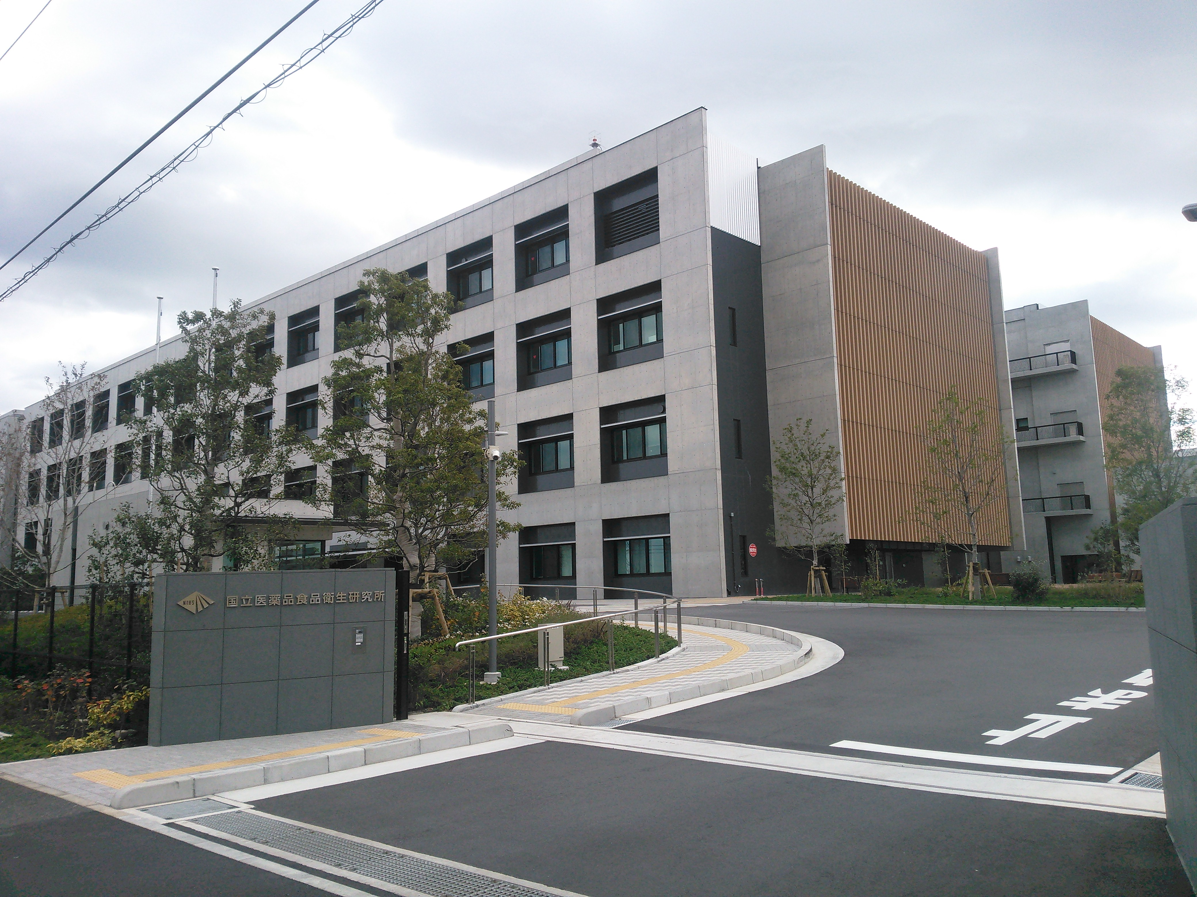 神奈川県川崎市川崎区殿町、国立医薬品食品衛生研究所 川崎新庁舎